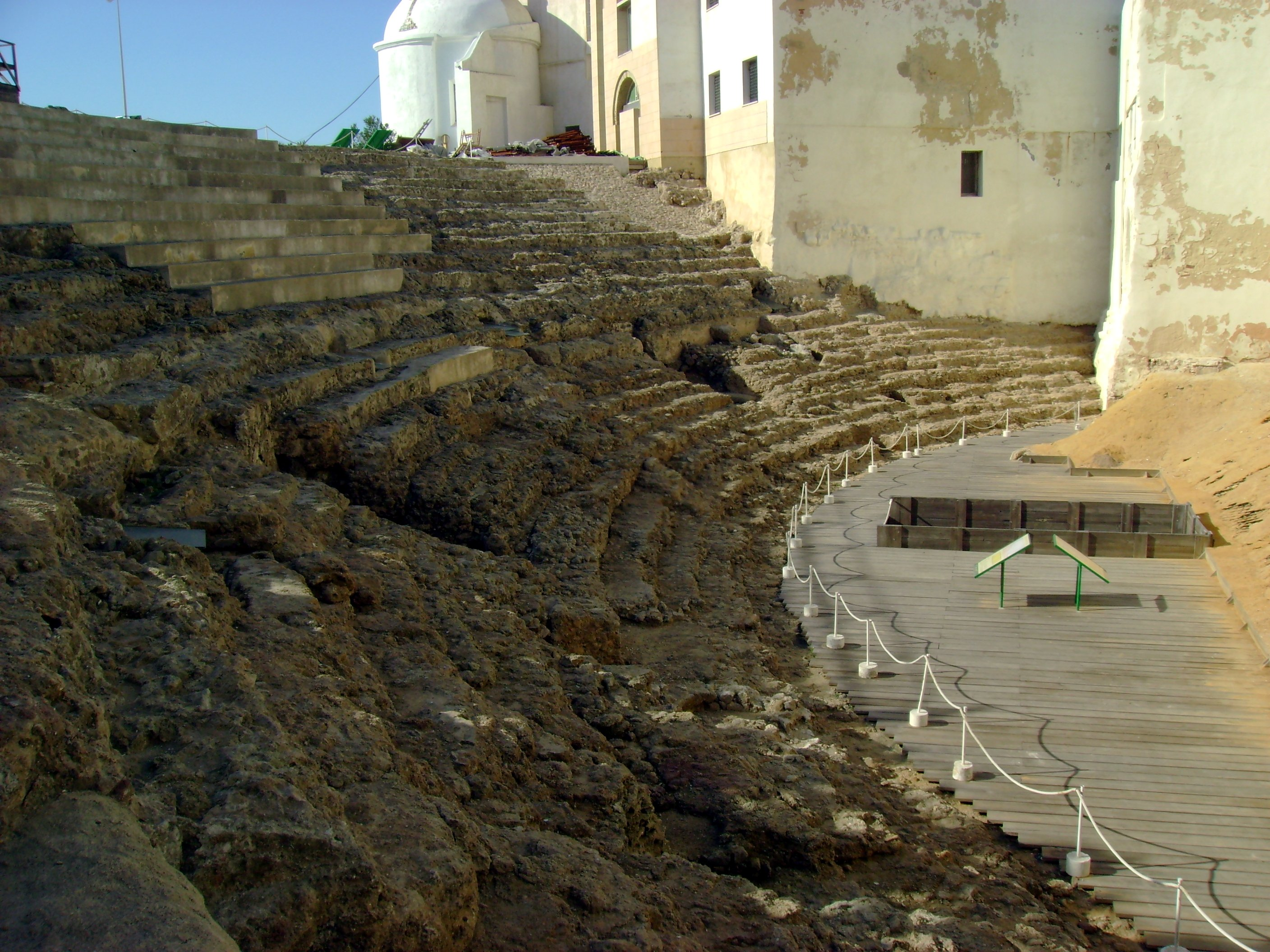 El Teatro romano de Cádiz de la ciudad homónima.